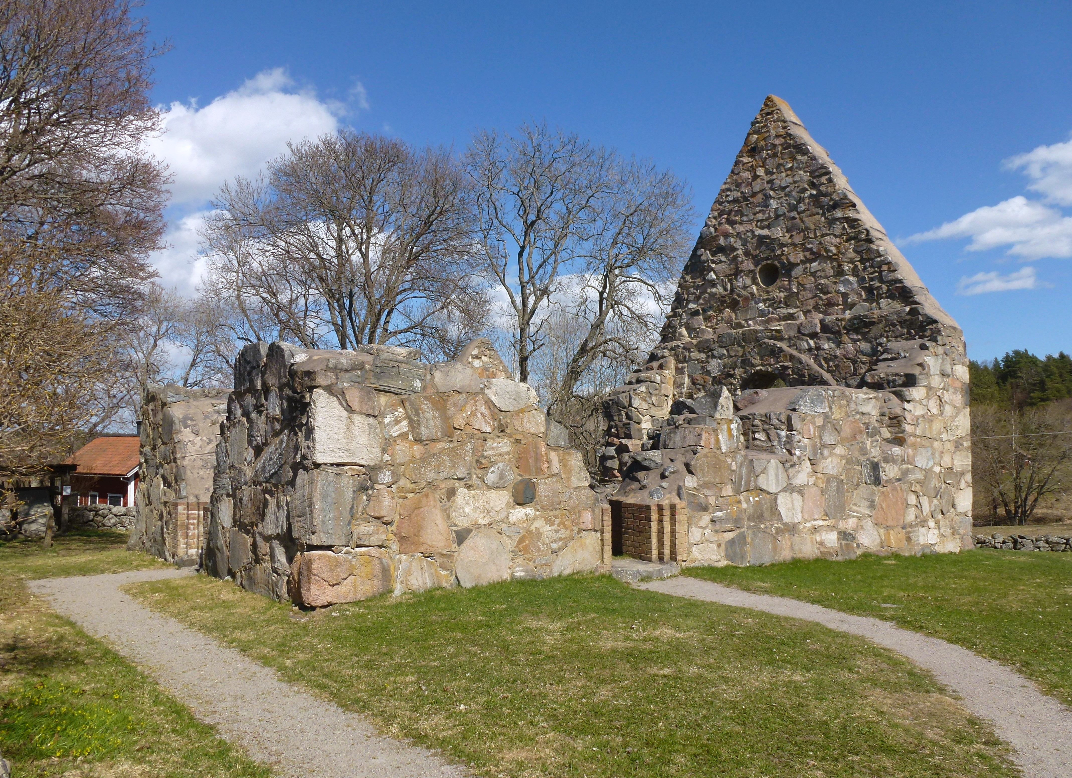 Össeby kyrkroruin